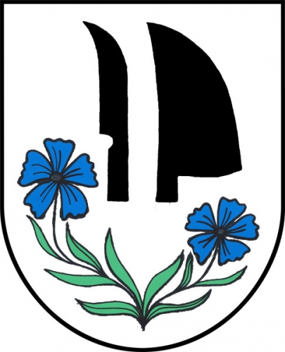 Znak, Police, okres Šumperk